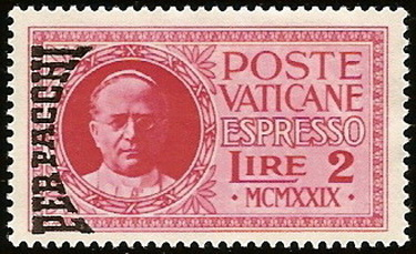 Посылочная марка Ватикана, 1931